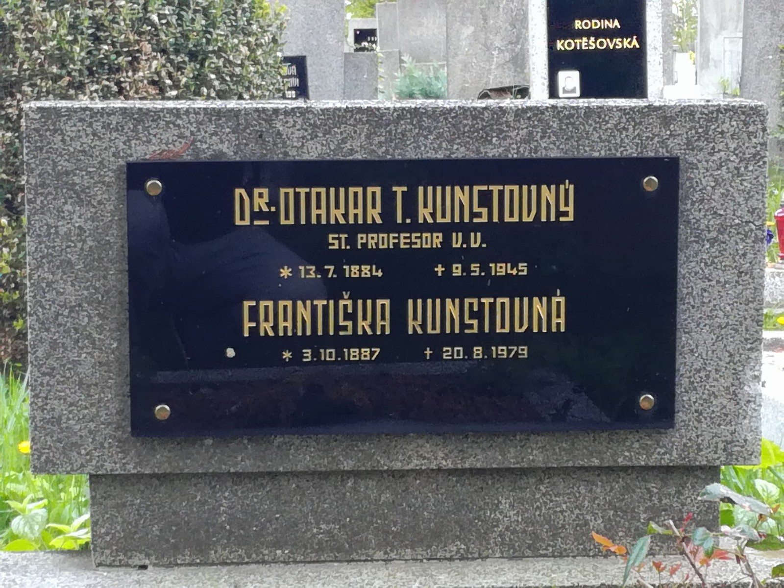 na hřbitově Košíře, Praha 5, Pod Kotlářkou 98-7, 2017-04-23